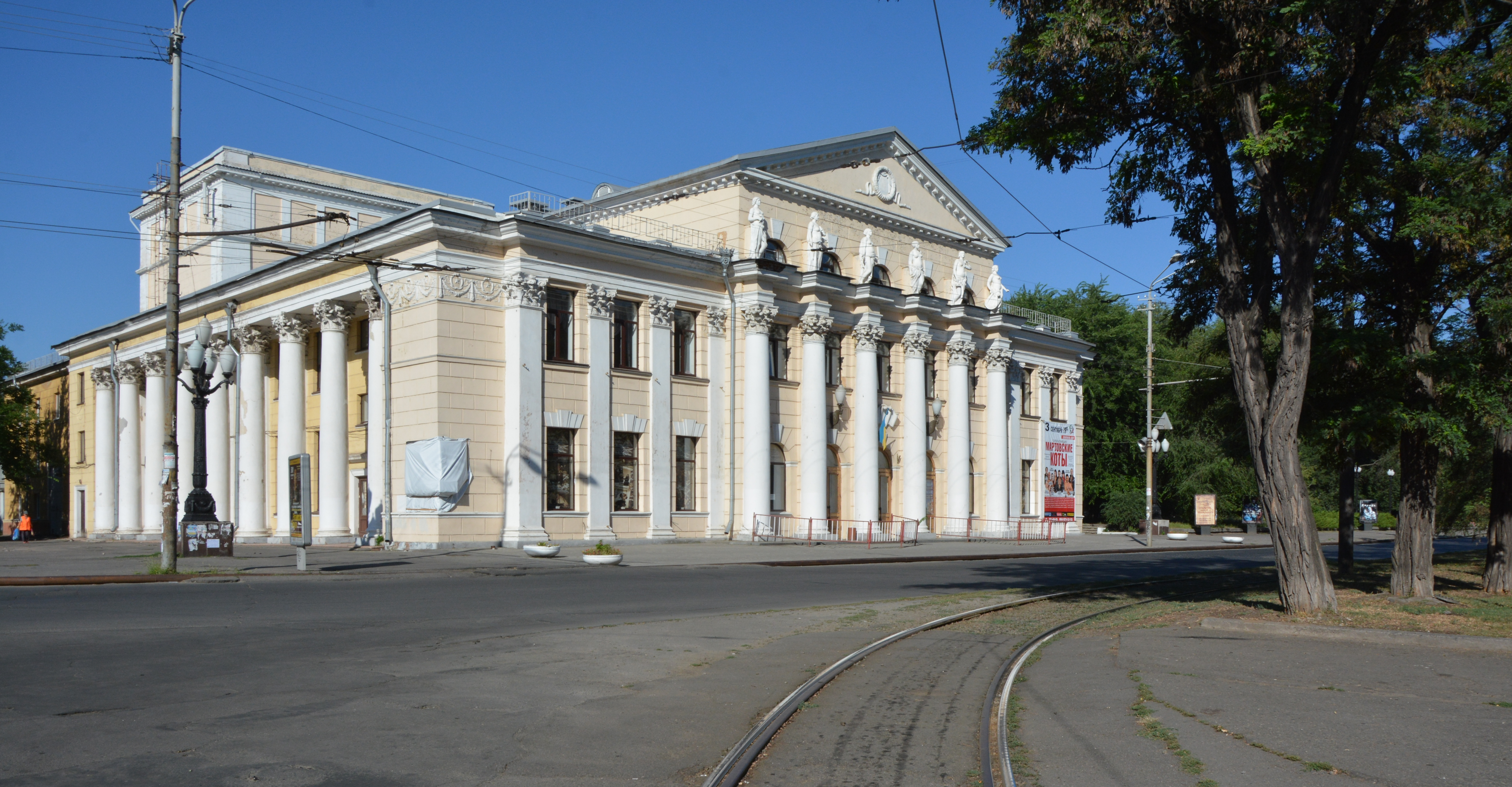 Зимовий театр (мур.) — Будинок, в якому відбувся П Всеукраїнський з'їзд Рад та виступали Орджонікідзе Г.К. (на пленумі Катеринославської Ради робітників та солдатських депутатів), Калінін М.І. та Ворошилова К.Є. (на пленумі Катеринославської Ради) Мем. дошка, Дніпропетровськ, Карла Маркса просп., 97